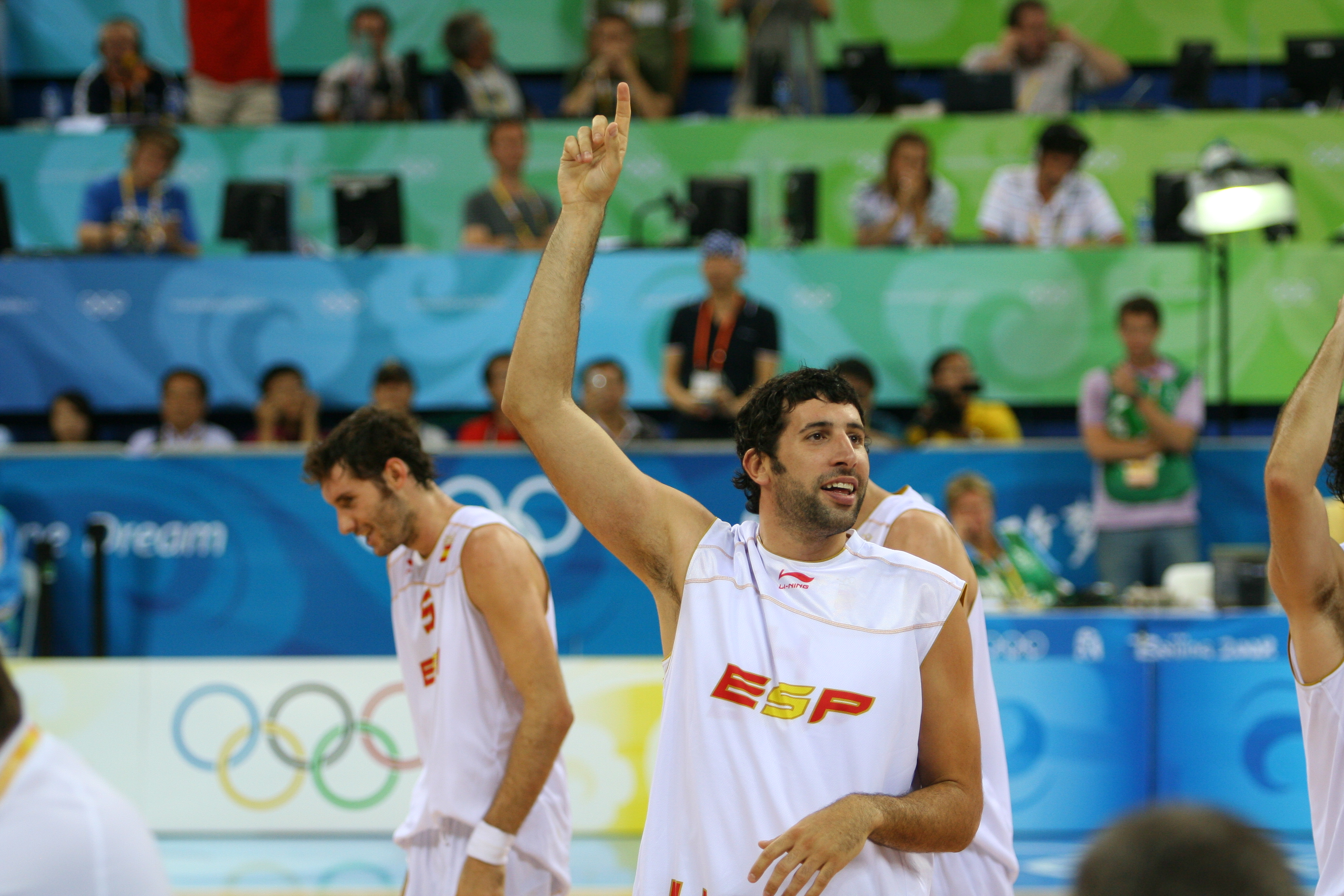 Los jugadores de la selección española de baloncesto Álex Mumbrú (centro) y Rudy Fernández (izquierda). Semifinales de los J.J.O.O. Beijing 2008.